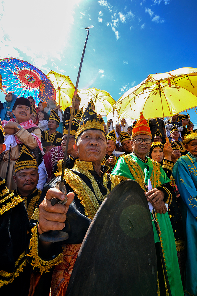 Kenduri Sko Semurup merupakan salah satu dari kegiatan ritual adat masyarakat kabupaten kerinci, yang di lakukan dalam tahun tahun tertentu, adapun kegiatan yang d lakukan adalah pencucian benda pusaka adat nenek moyang dan pemberian gelar adat kepada orang yang di pilih